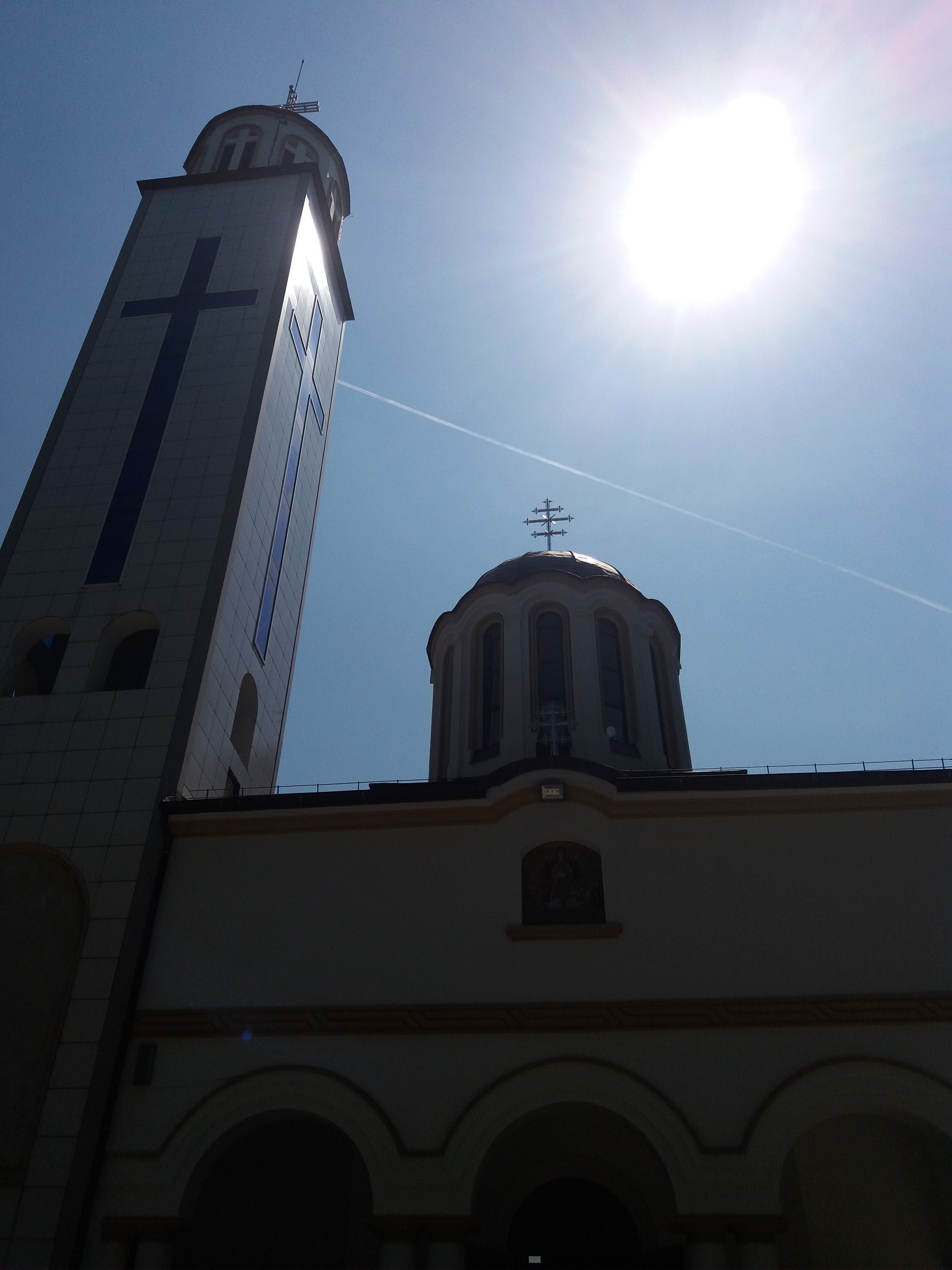 Manastirea Maglavit din judetul Dolj, Oltenia, România